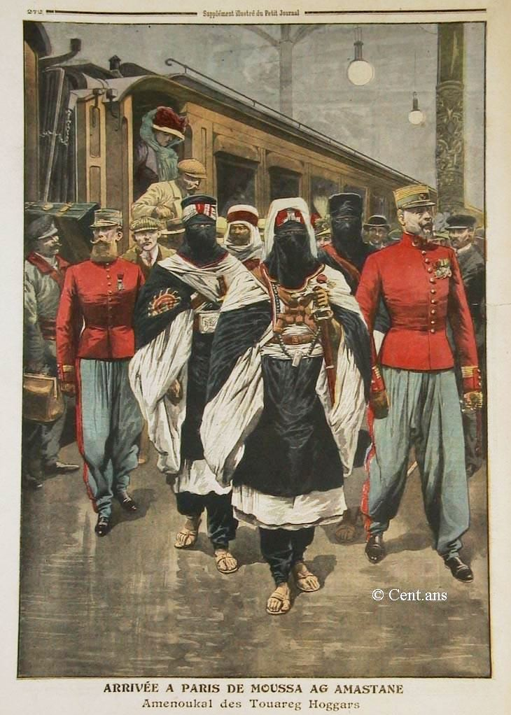 Tašlḥiyt/ⵜⴰⵛⵍⵃⵉⵜ: ⵢⴰⵏ ⵡⵓⵏⵓⵖ ⵏ ⵎⵓⵙⴰ ⴳⴳⵯ ⵓⵎⵙⵜⴰⵏ, ⴰⵎⵏⵓⴽⴰⵍ ⵏ ⵓⵀⴳⴳⴰⵔ, ⵍⵍⵉⵖ ⵏⵏ ⵉⵍⴽⵎ ⴱⴰⵔⵉⵣ ⵖ 1910